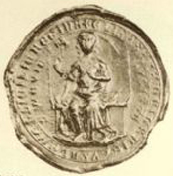 Elisabeth von Bayern (1227–1273)